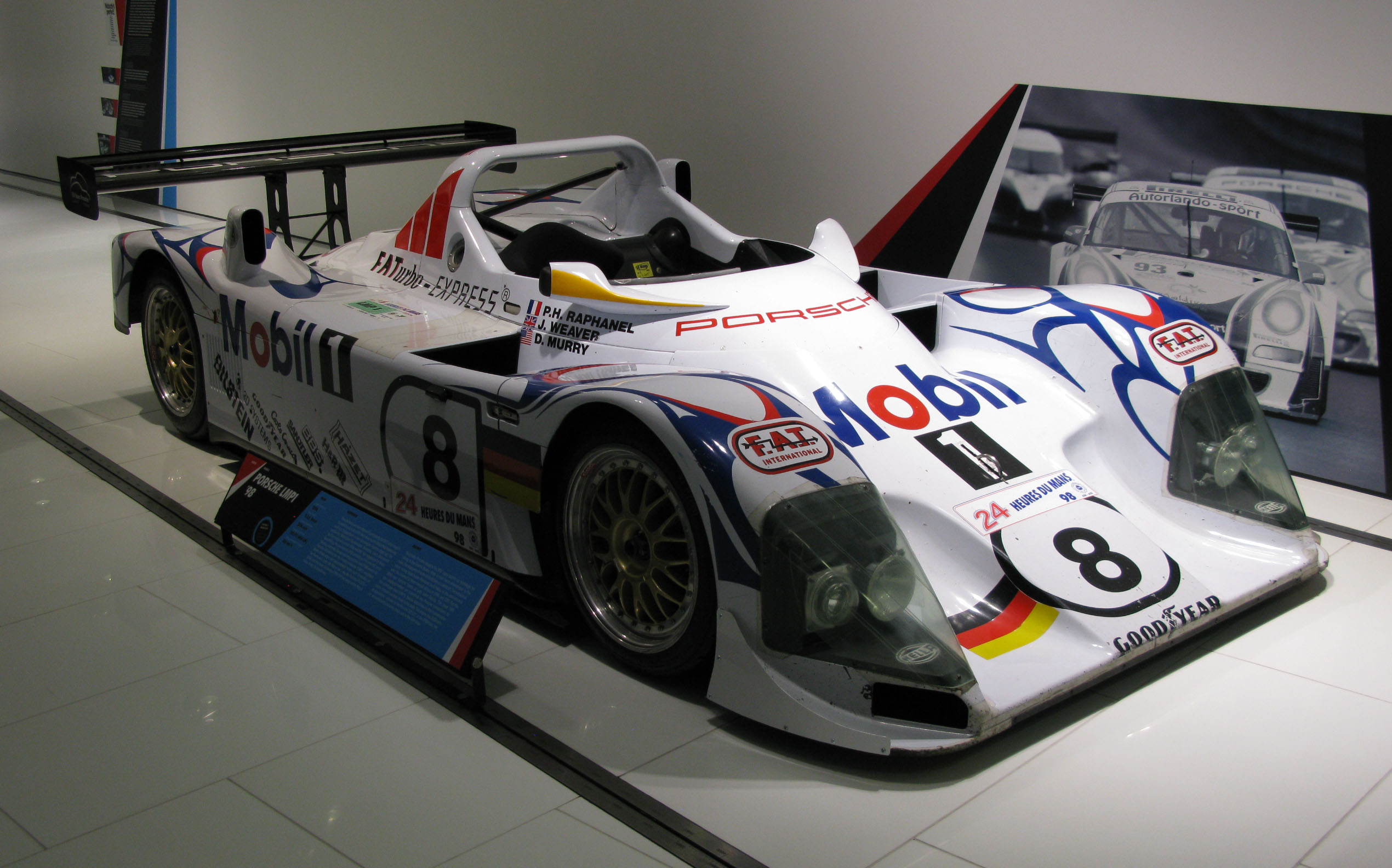 Porsche LMP1-98